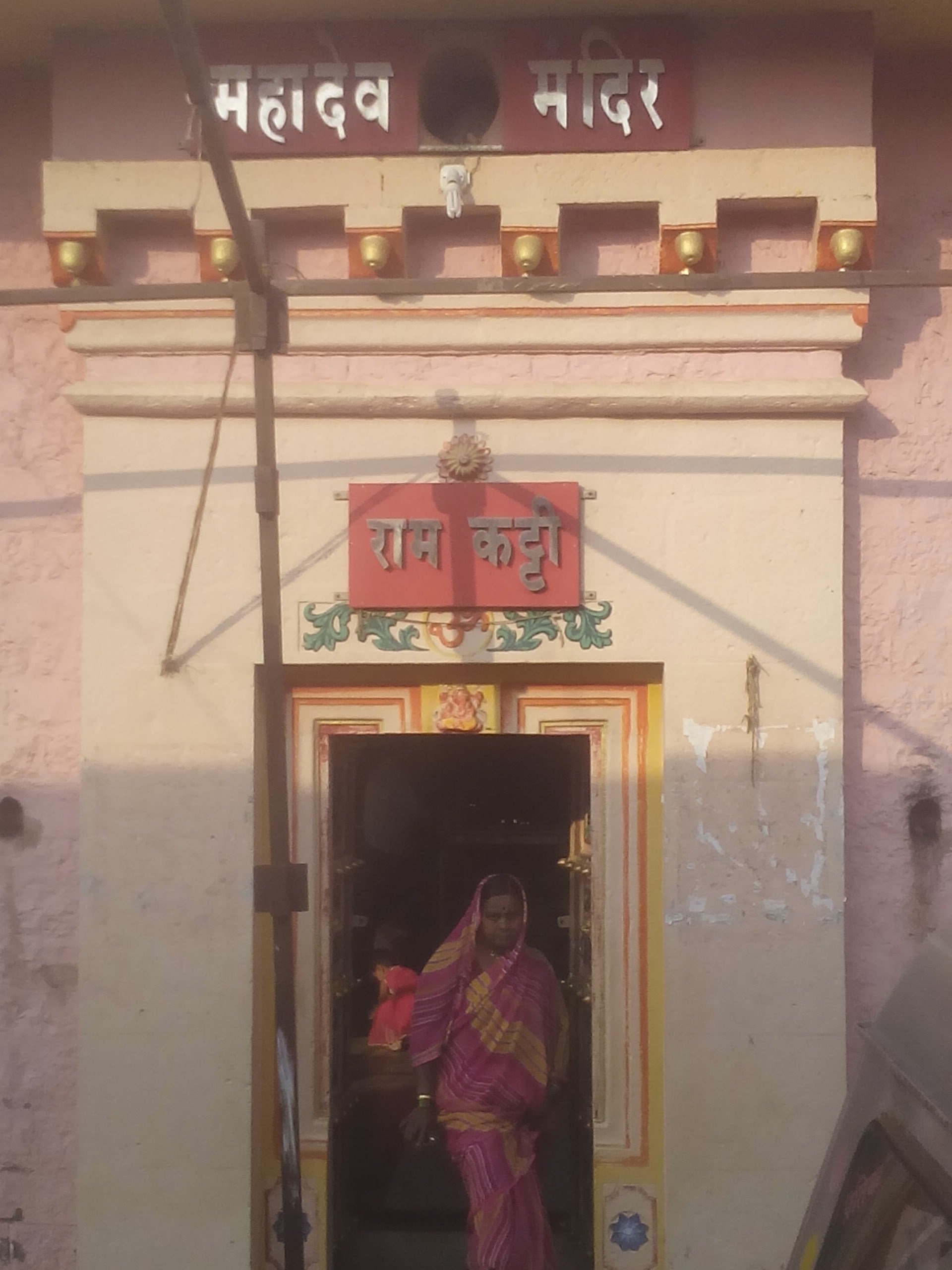 हे मंदिराचे सुबक प्रवेशद्वार आहे.